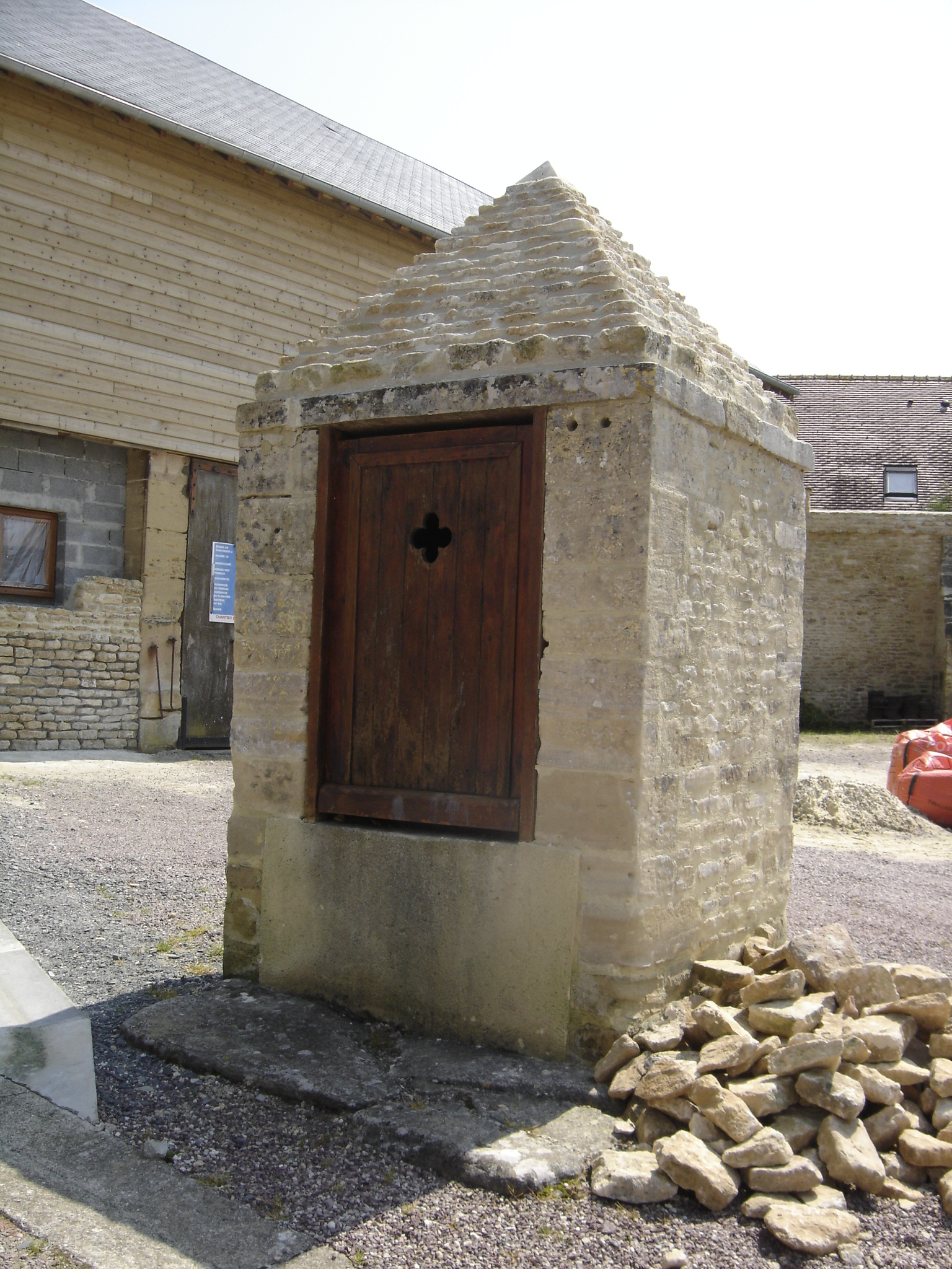 Puits couvert restauré